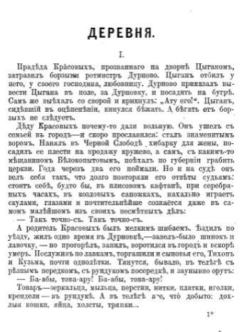 Рассказ И. А. Бунина "Деревня", опубликованный в 5-м томе Полного собрания сочинений (1915)